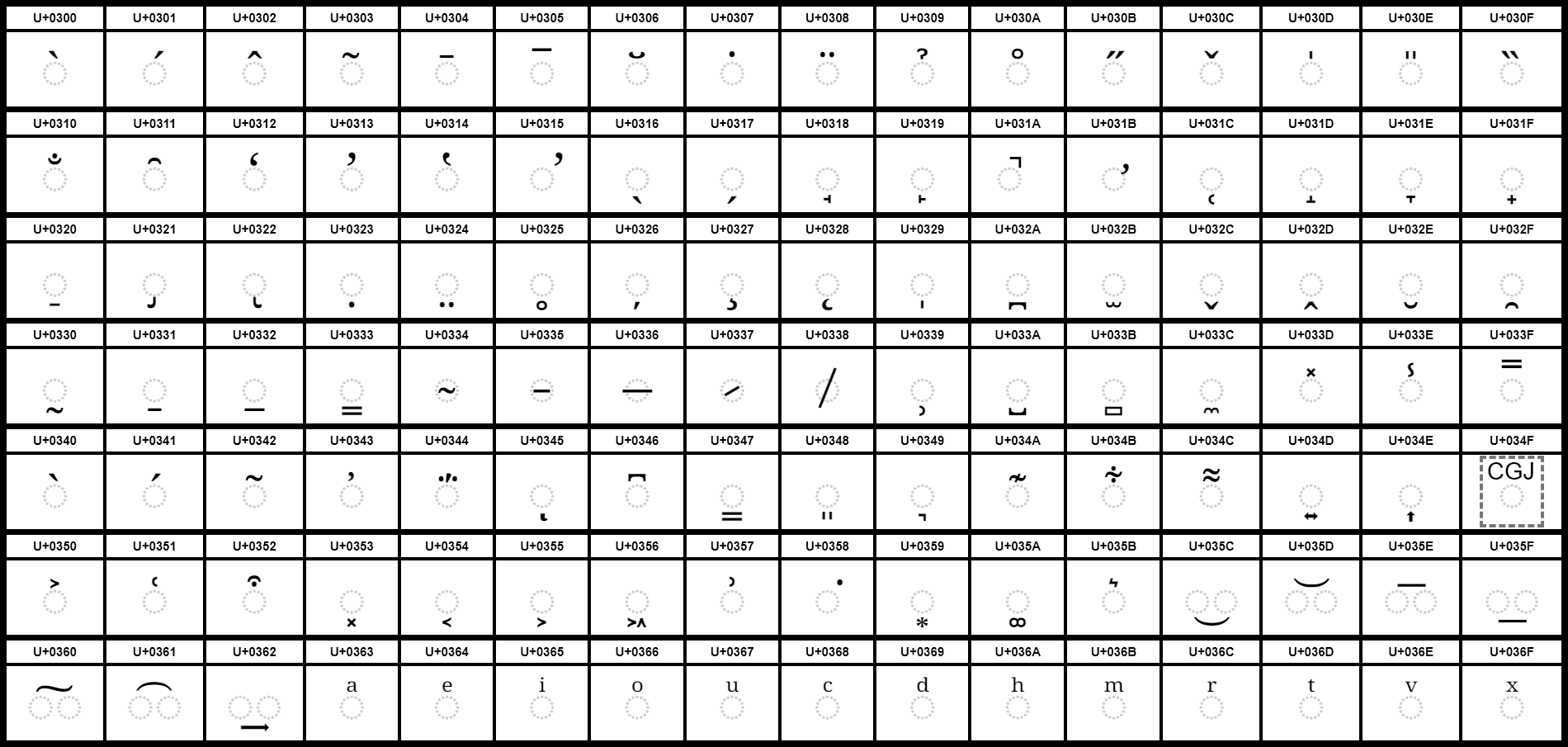 Grafiktafel des Unicodeblock Kombinierende diakritische Zeichen. Doppelt schraffierte Felder sind Kontrollzeichen.